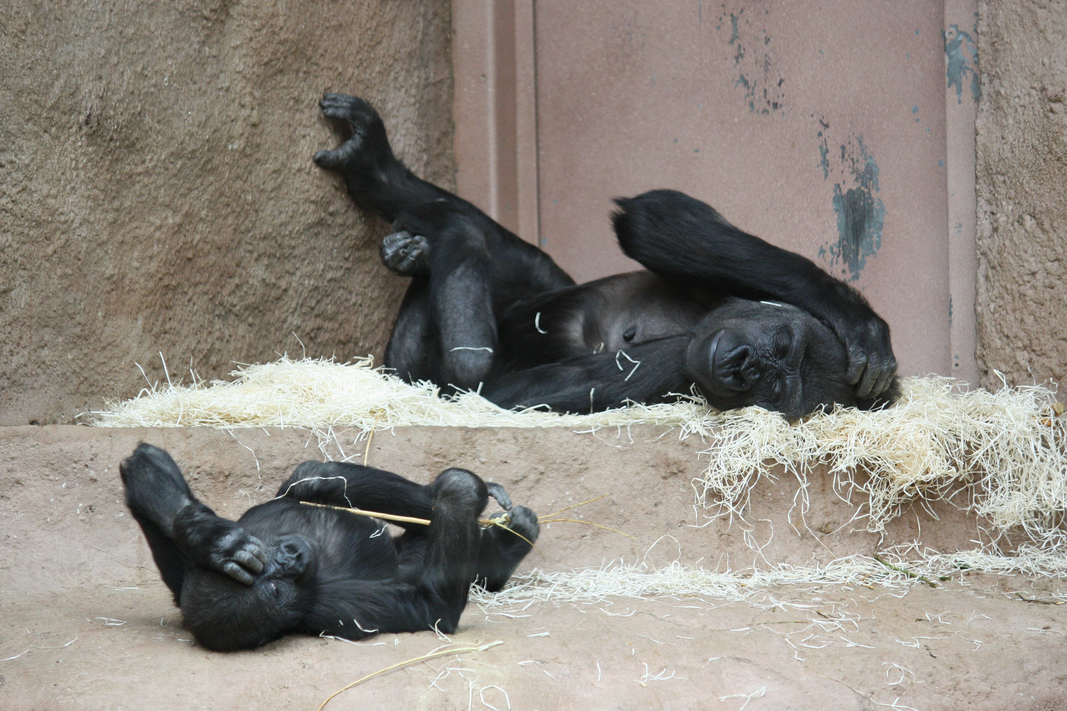 Zoo Praha